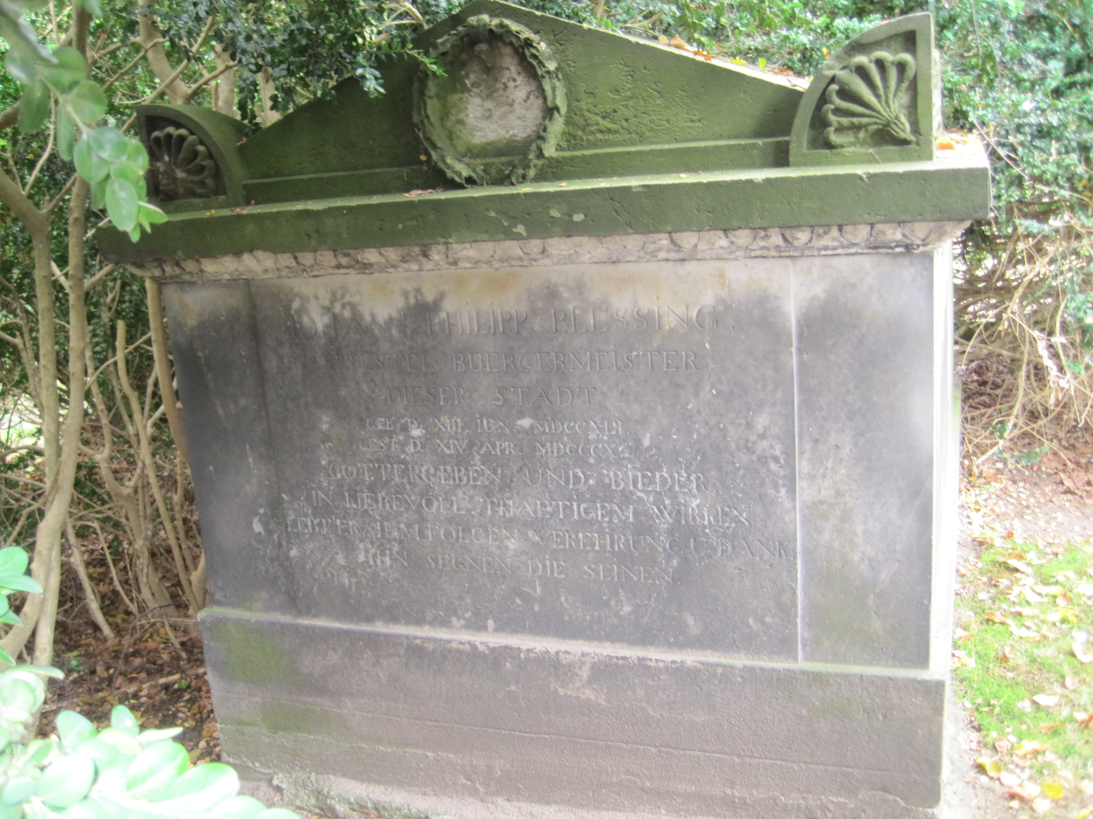 Grab auf dem St. Lorenz Friedhof in Lübeck